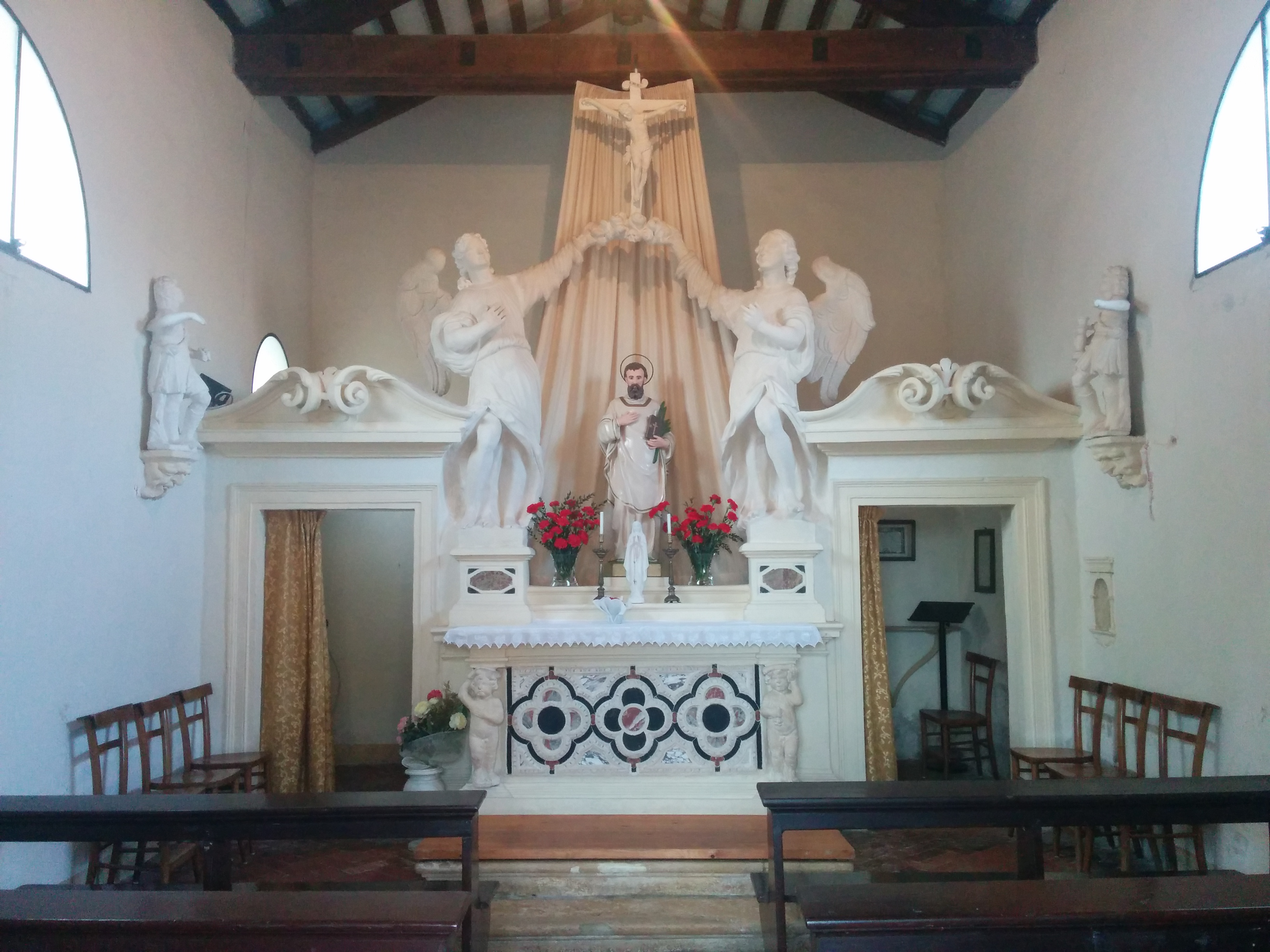 Interno dell'Oratorio di San Valentino a Costabissara, in provincia di Vicenza.